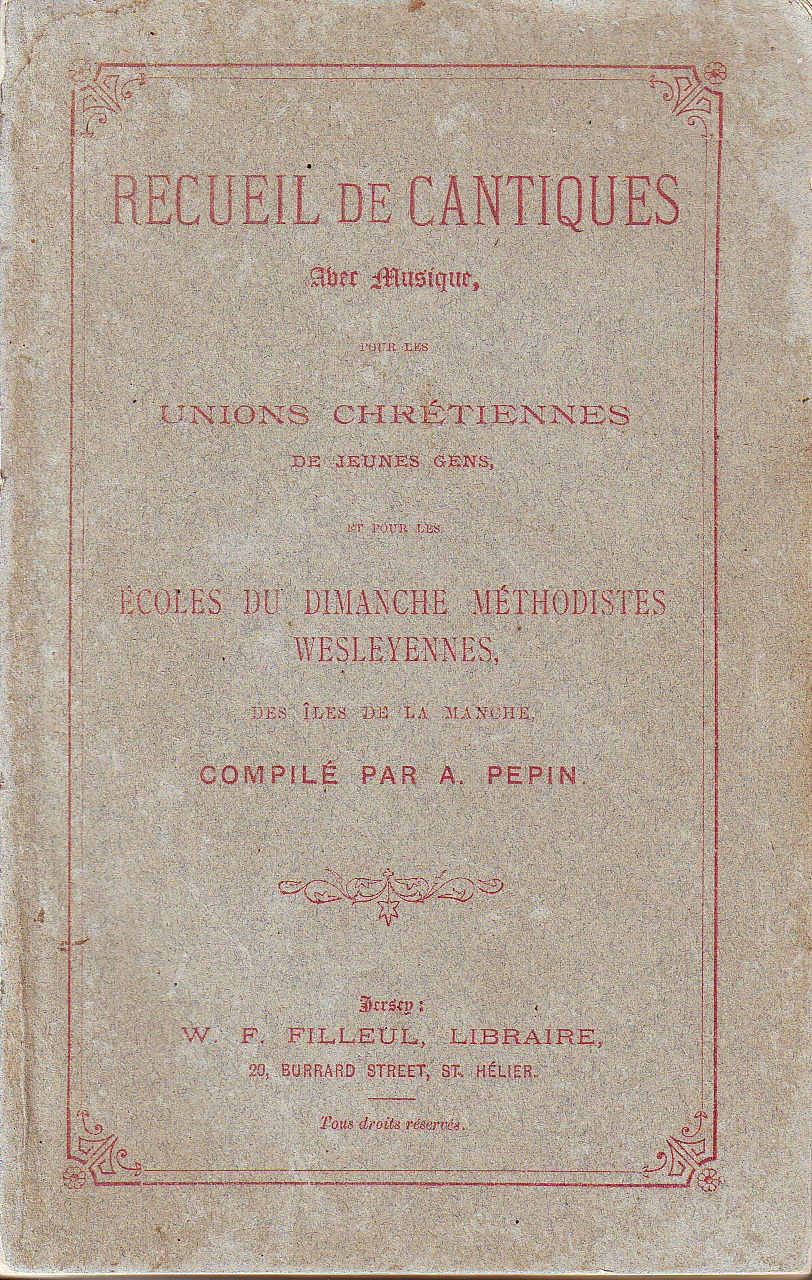 "Recueil de Cantiques avec musique pour les Unions Chrétiennes de jeunes gens et pour les écoles du Dimanche Méthodistes Wesleyennes, des Îles de la Manche, compilé par A. Pepin. Jersey: W.F. Filleul, Libraire, 20 Burrard Street, St. Hélier" - 1889